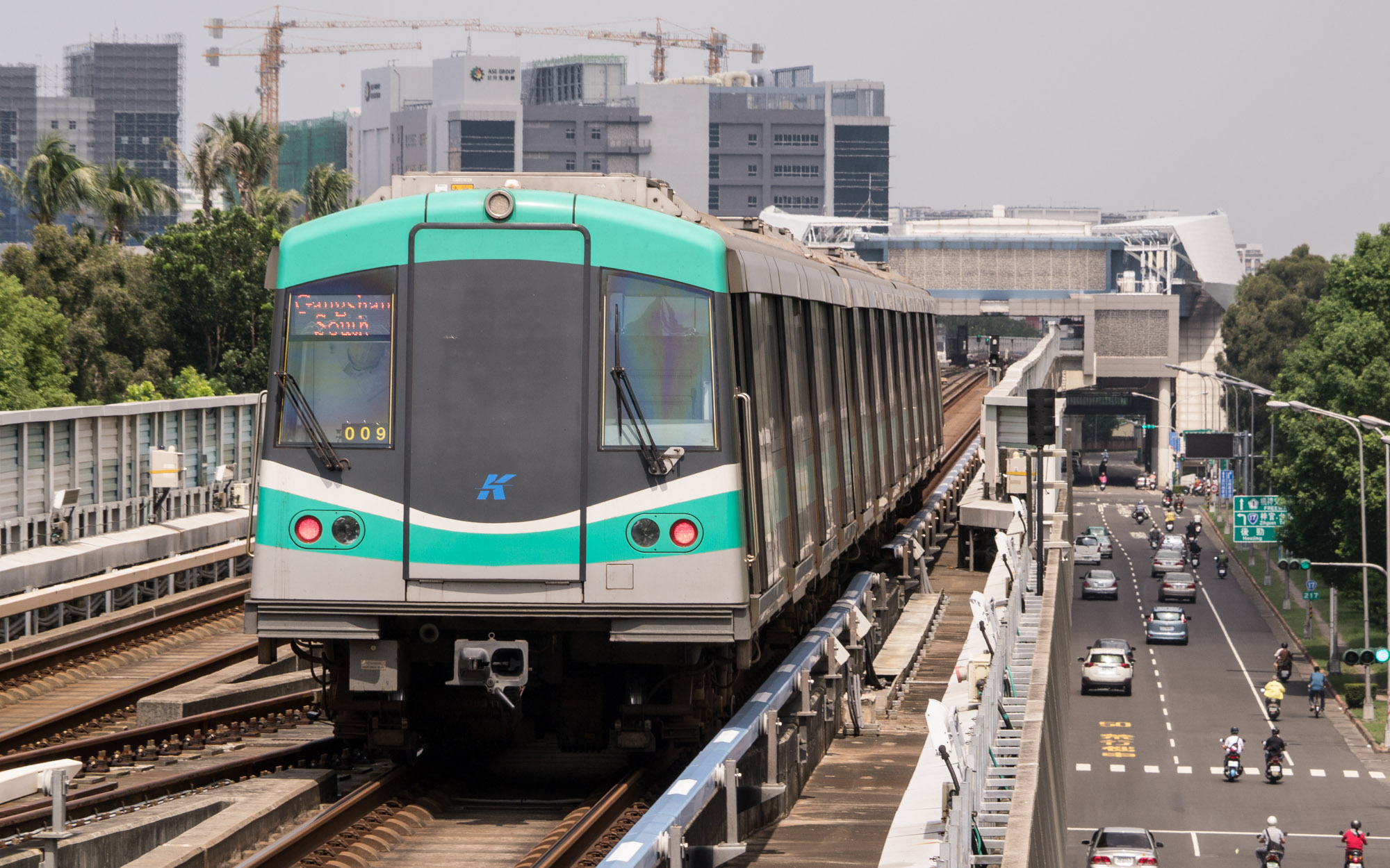 油廠國小站